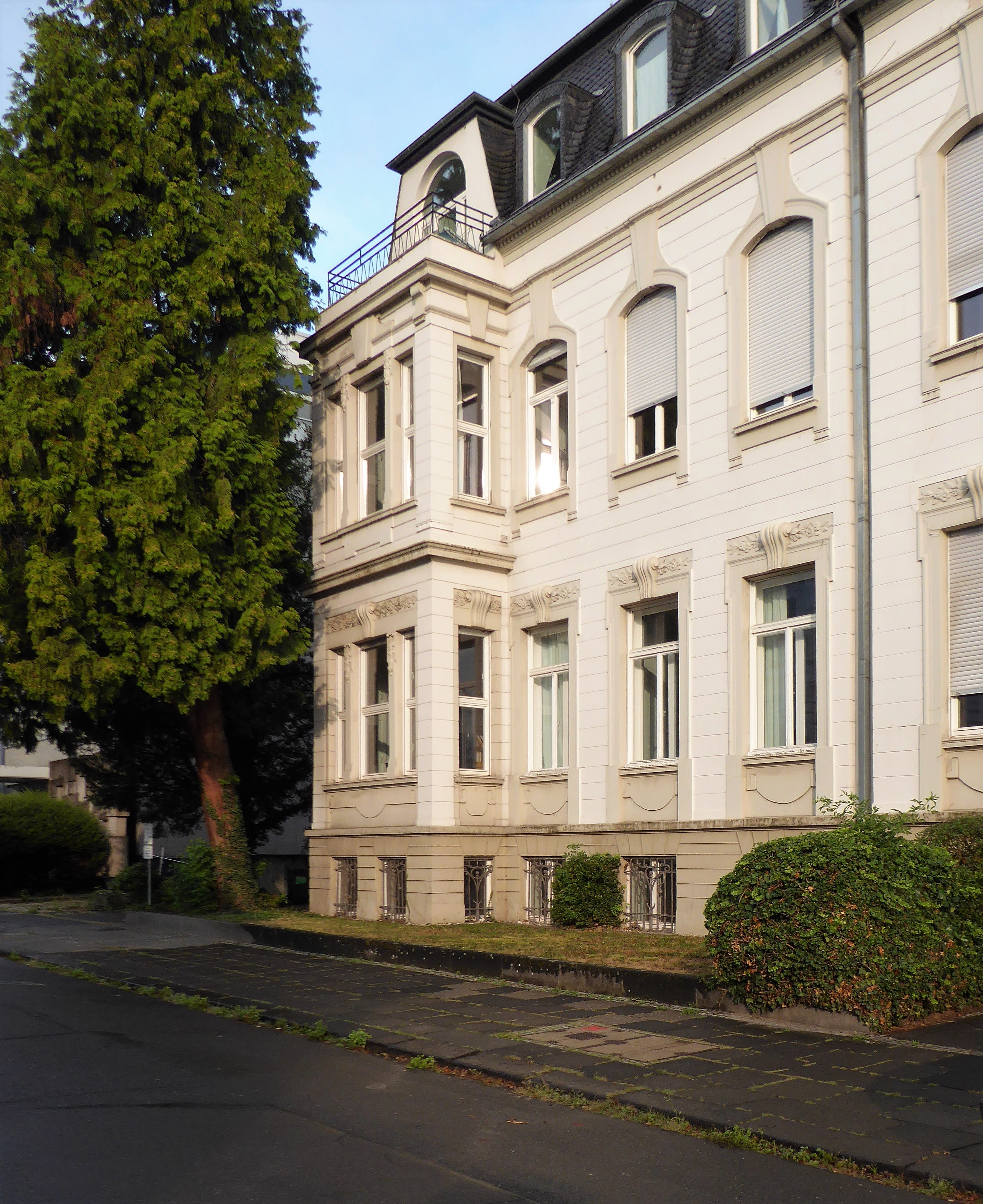 Sitz von EUROSOLAR e.V. - Europäische Vereinigung für Erneuerbare Energien - in Bonn, Kaiser-Friedrich-Straße 11